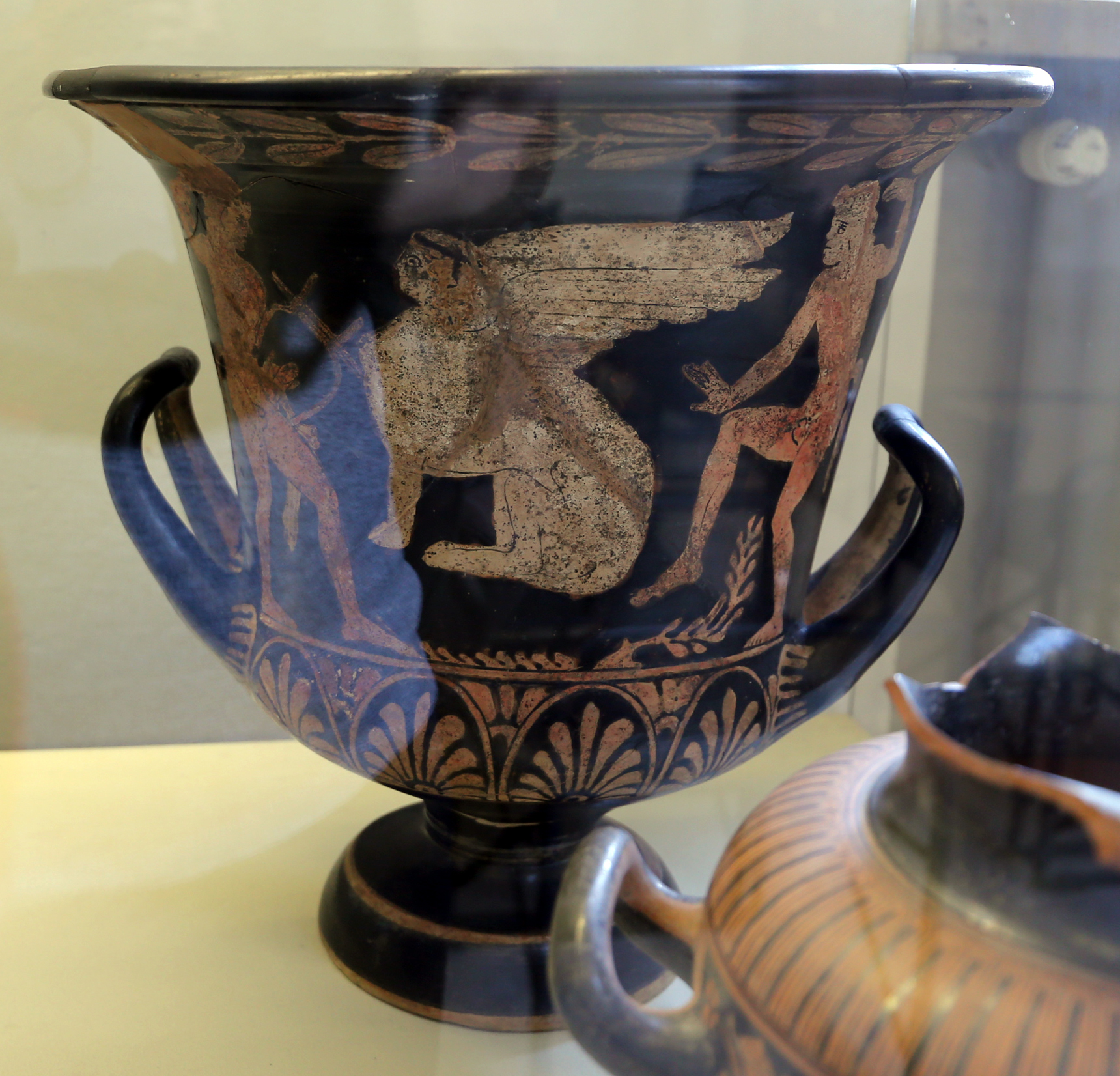 Collections of the Museo archeologico nazionale (Parma) This is a photo of a monument which is part of cultural heritage of Italy.